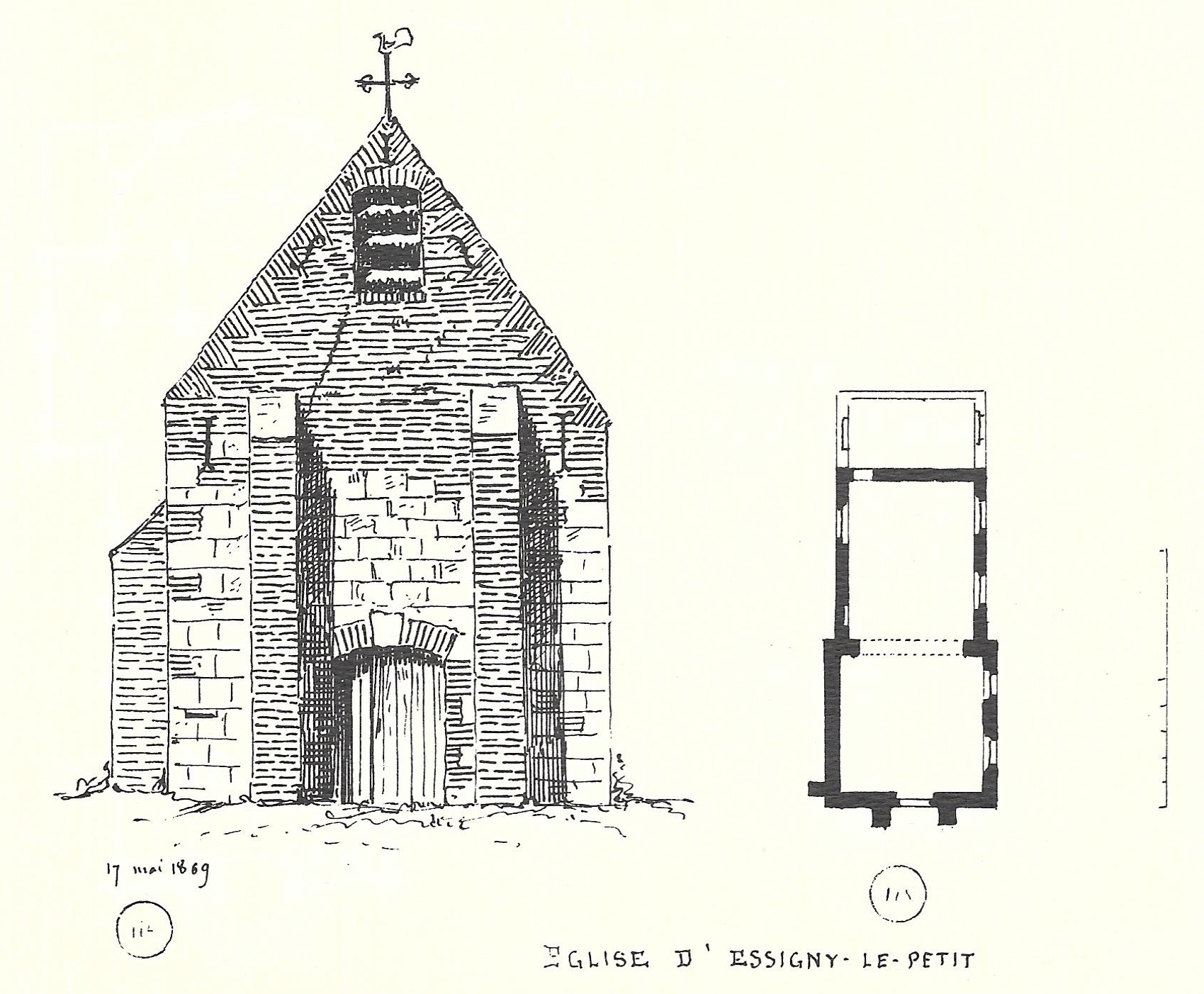 L'église en 1869.